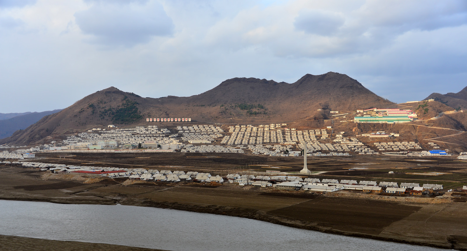 全景 三月五日青年铜矿